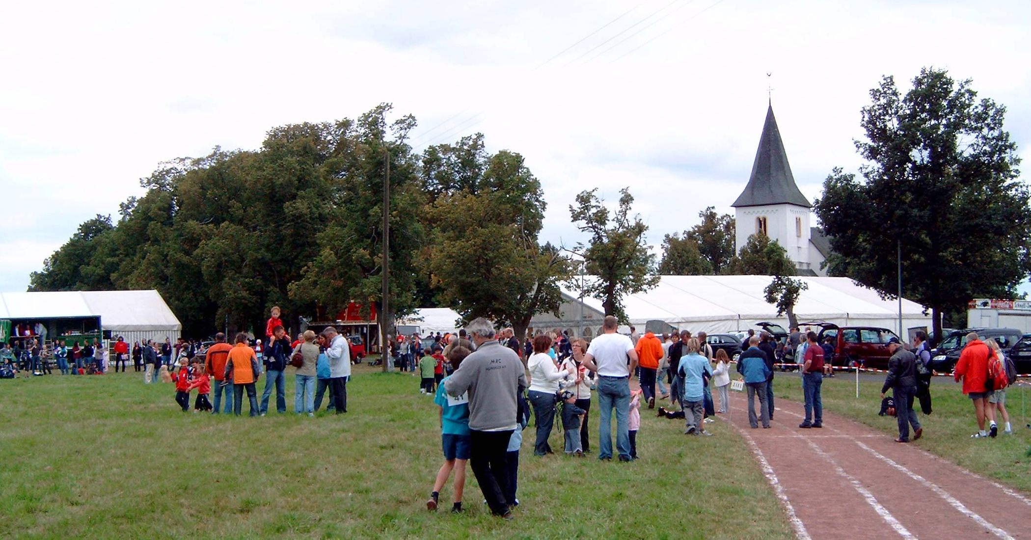 Gau Bergfest an der Nunkirche bei Sargenroth